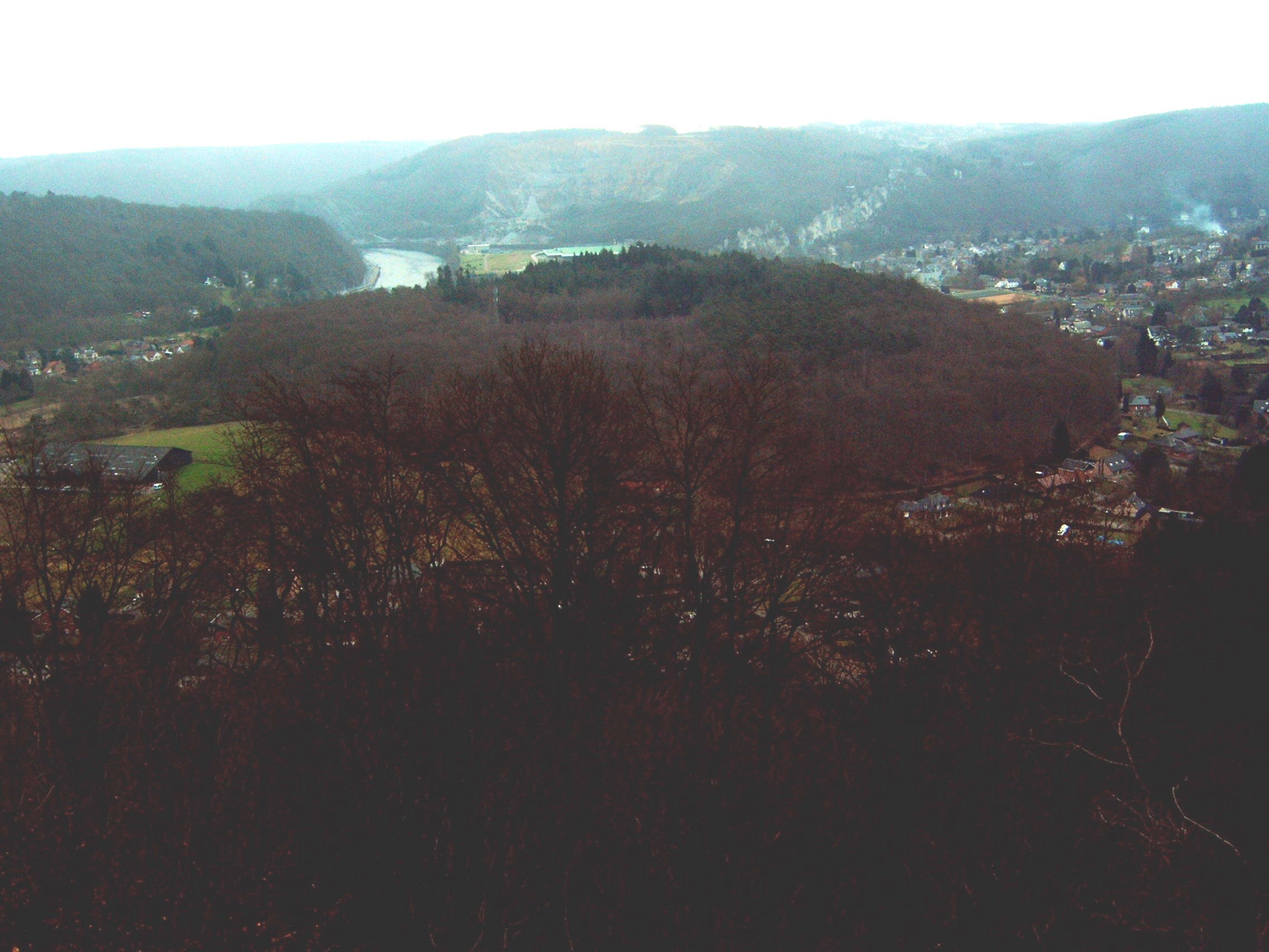 Profondeville gezien vanaf het uitzichtspunt Siberie. Eigen opname van 12 feb. 2006.